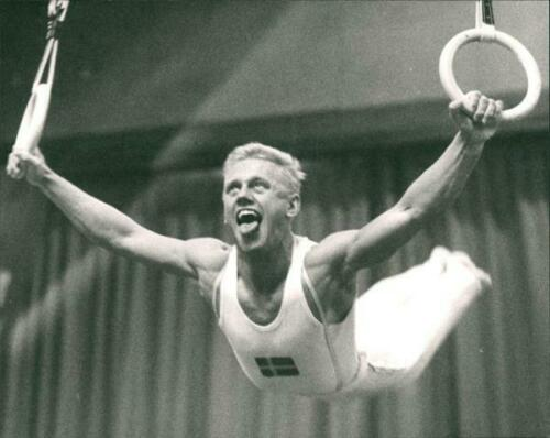 Leif Korn